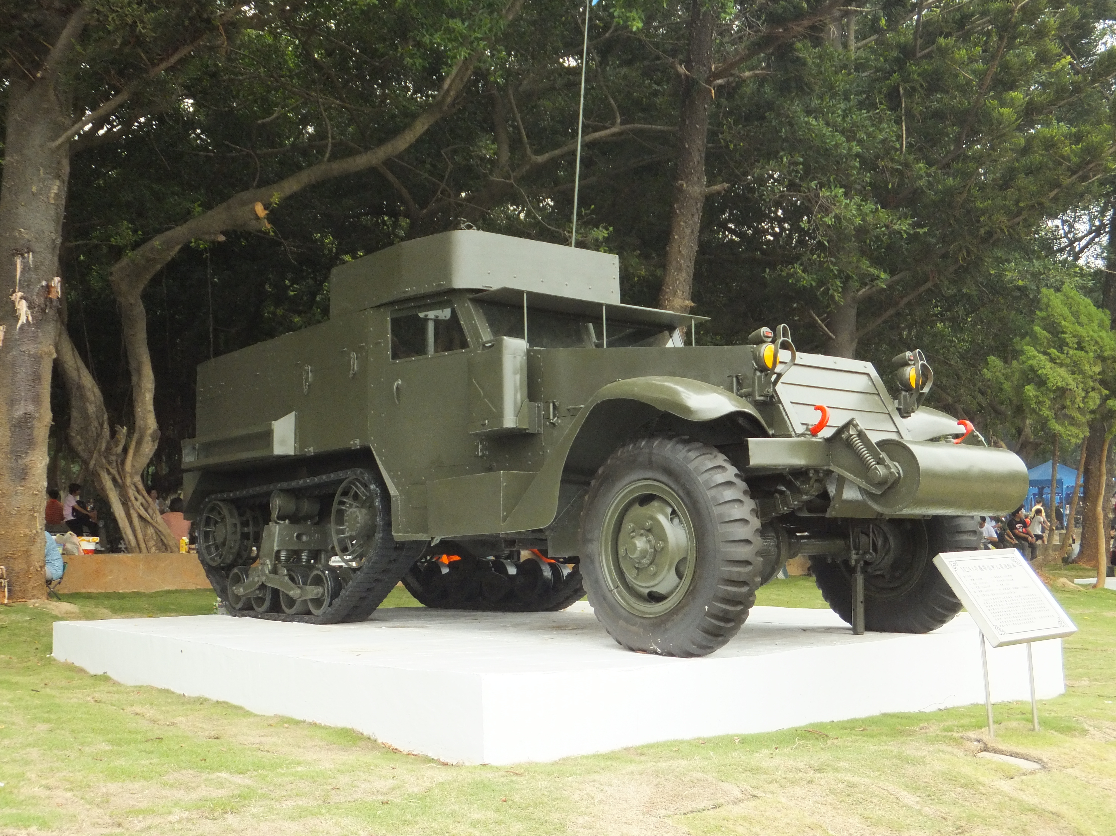 成功嶺介壽臺陳列之M2A1半履帶裝甲人員運輸車右側，中華民國陸軍1943年於駐印度伽藍戰車營開始接收使用。本車原置於298旅萬金營區展示，2011年移設至此。